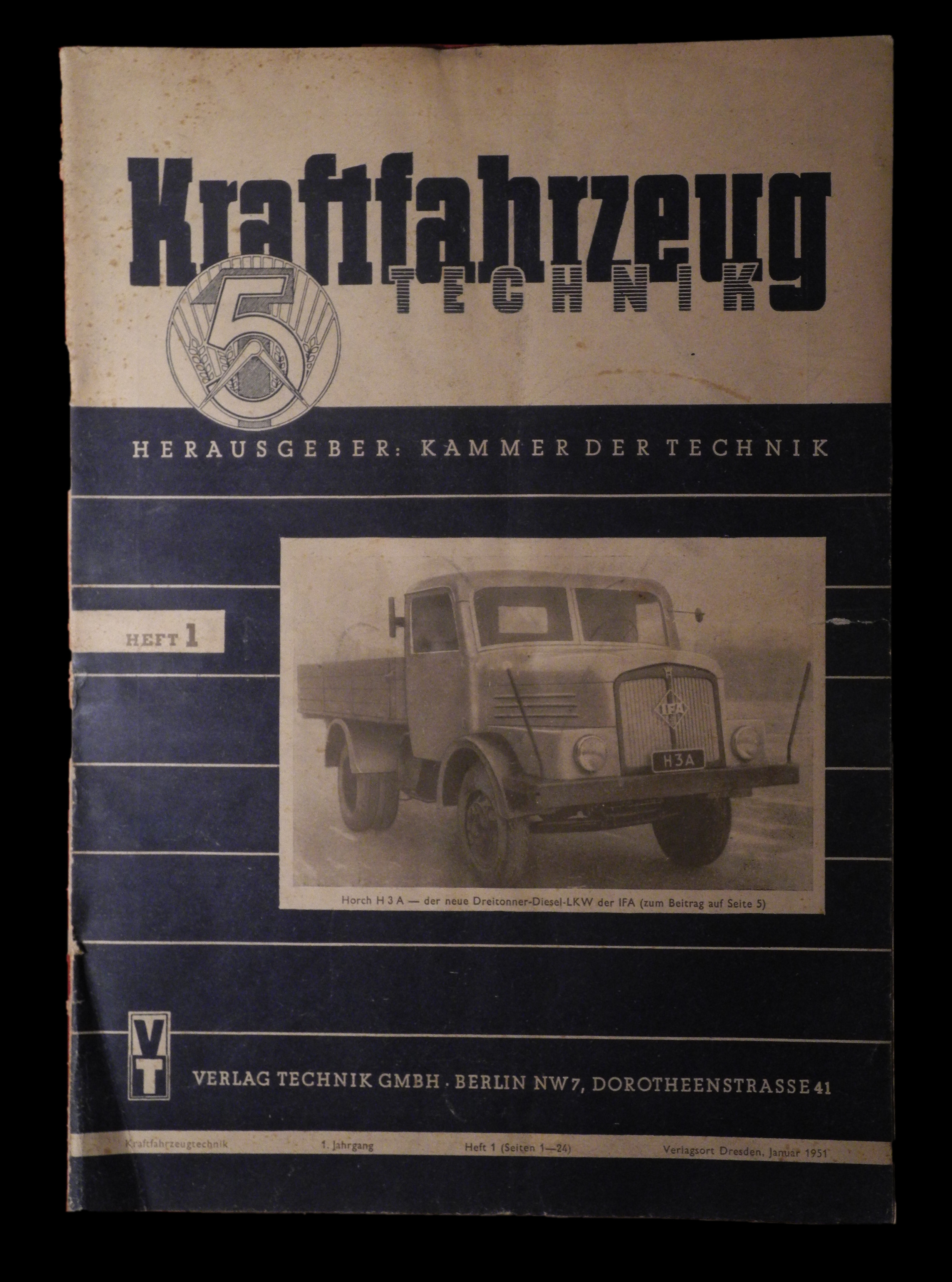 Erstausgabe 1/1951 der Kraftfahrzeugtechnik